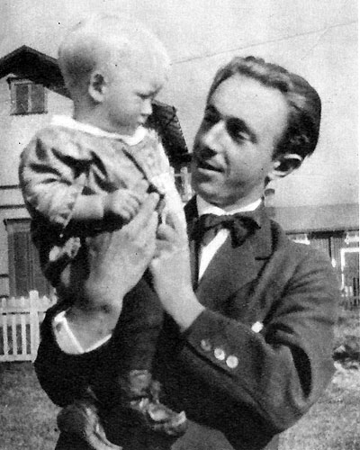 Einar Wallquist